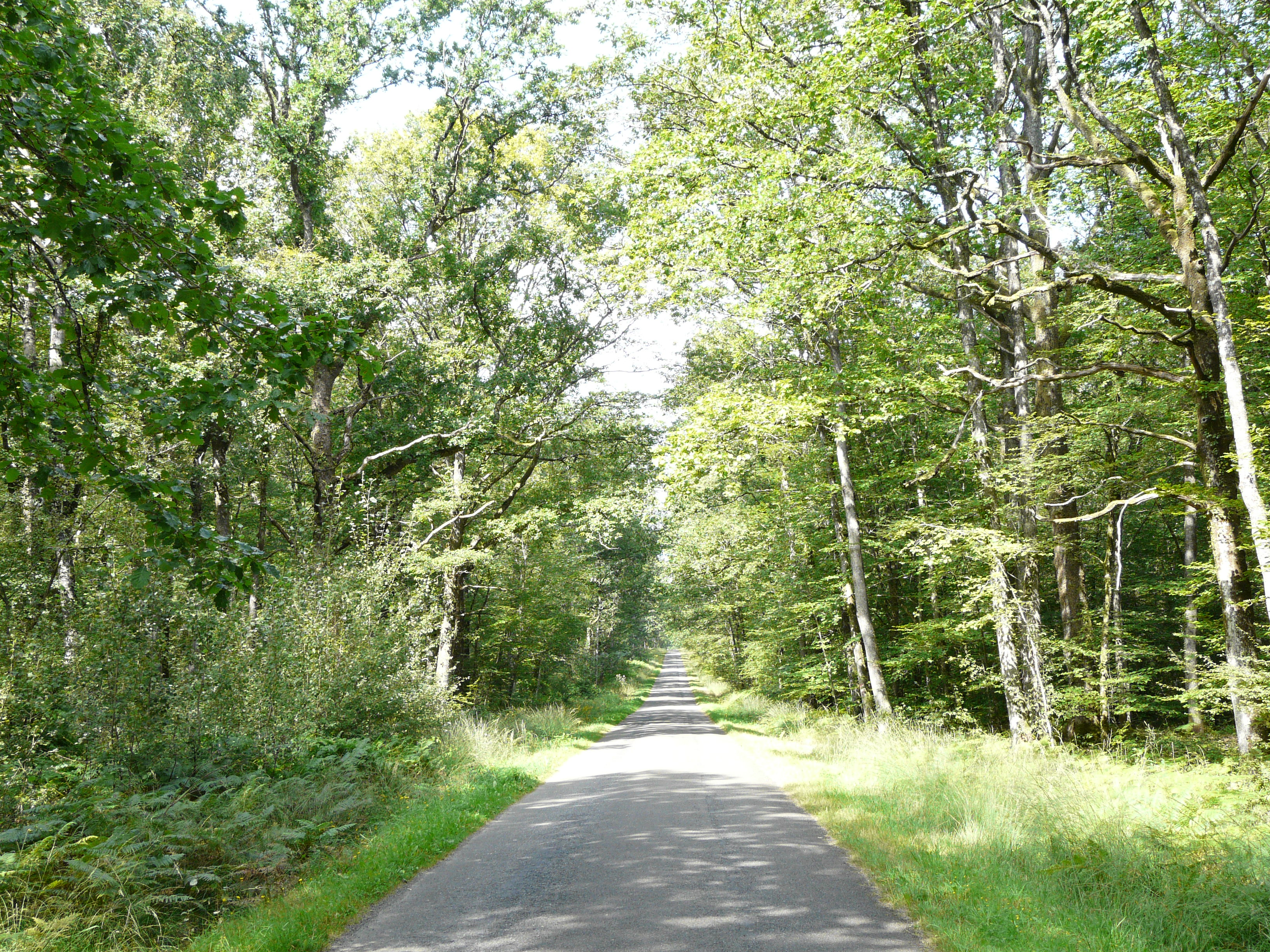 Passage dans la Forêt de Juigné